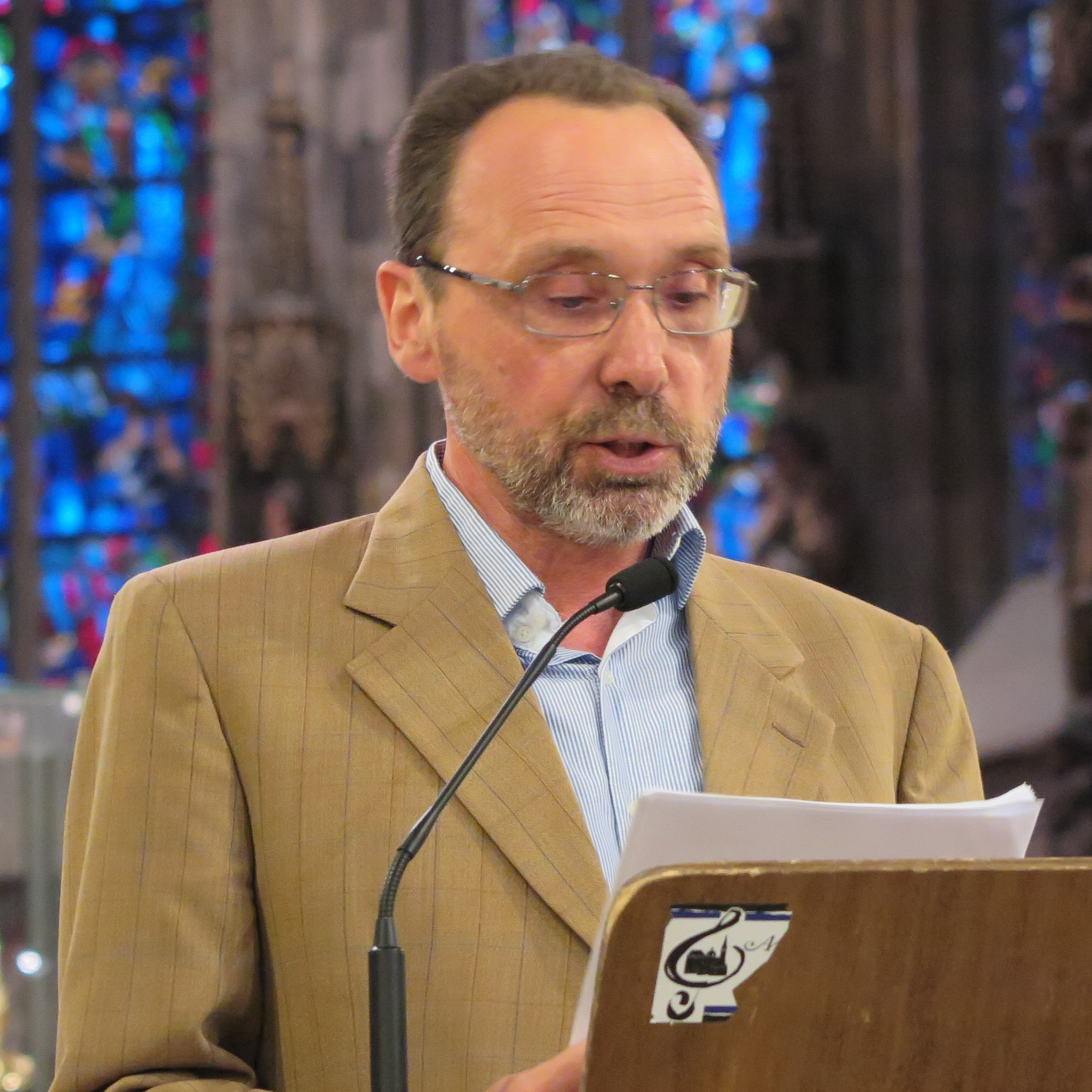 Professor Dr. Hubert Houben während seines Vortrags „Friedrich II. - ein Sizilianer auf dem Kaiserthron?“ im Aachener Dom anlässlich der Feierlichkeiten „800 Jahre Karlsschrein“.